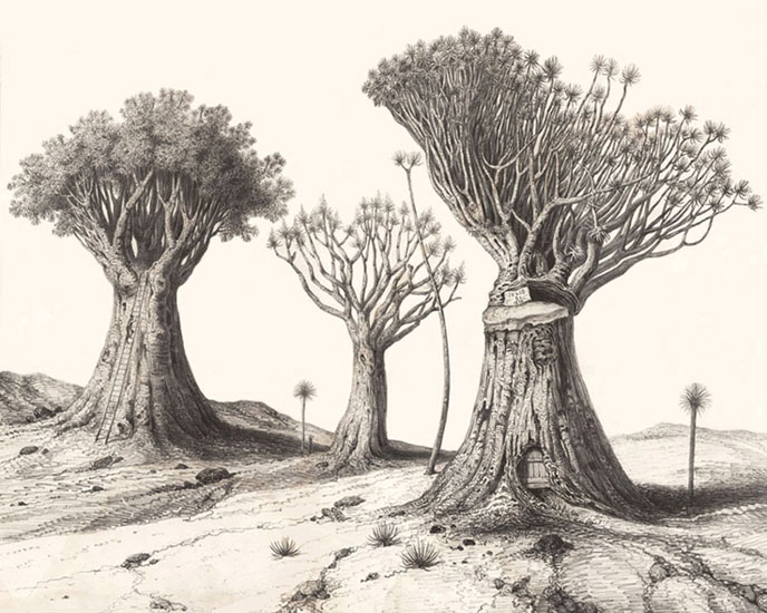 Grabado de los dragos de la Casa de Franchy en la Villa de La Orotava, publicado en 1838 en su obra "Histoire Naturelle des Iles Canaries. Atlas"